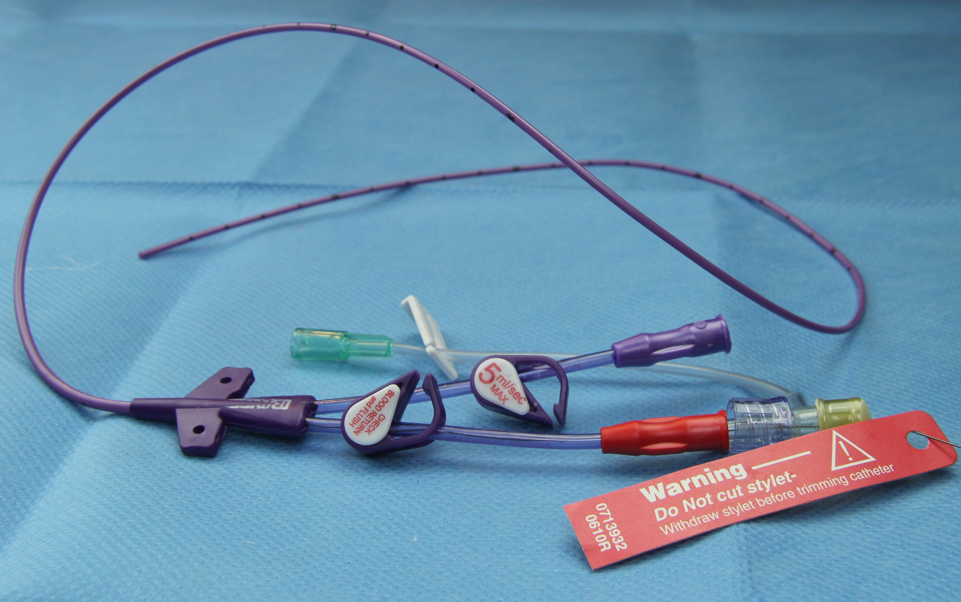 PICC line. 2 lumens polyuretan kateter